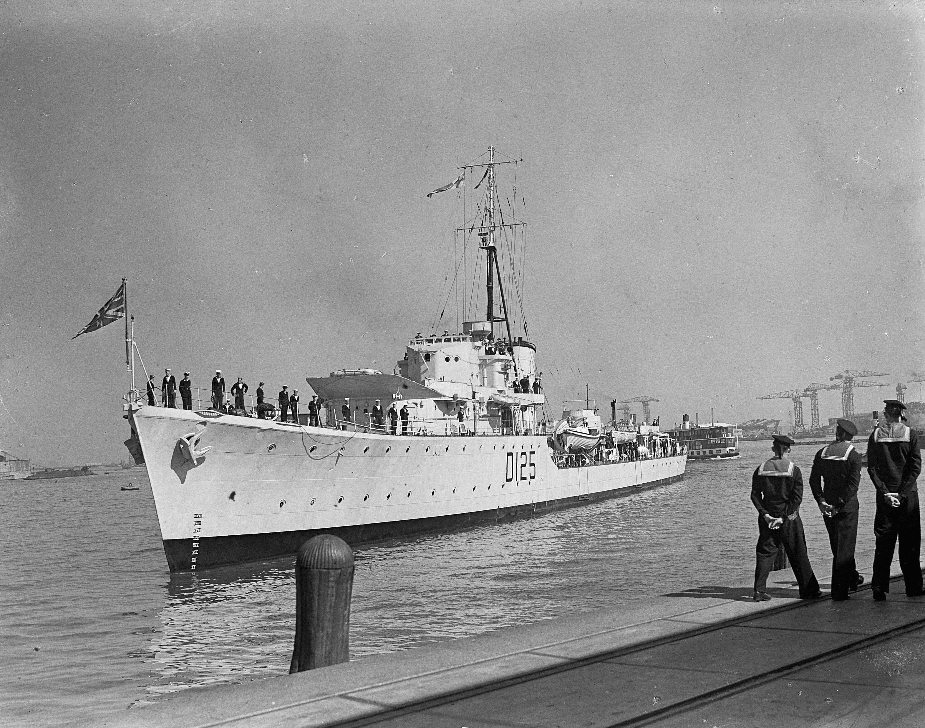 Collectie / Archief : Fotocollectie Anefo Reportage / Serie : [ onbekend ] Beschrijving : Torpedovlootjager "Nepal" met Lord Fraser , aankomst Datum : 12 mei 1950 Trefwoorden : AANKOMST Persoonsnaam : Fraser, Lord Fotograaf : Noske, J.D. / Anefo Auteursrechthebbende : Nationaal Archief Materiaalsoort : Glasnegatief Nummer archiefinventaris : bekijk toegang 2.24.01.09 Bestanddeelnummer : 903-9548